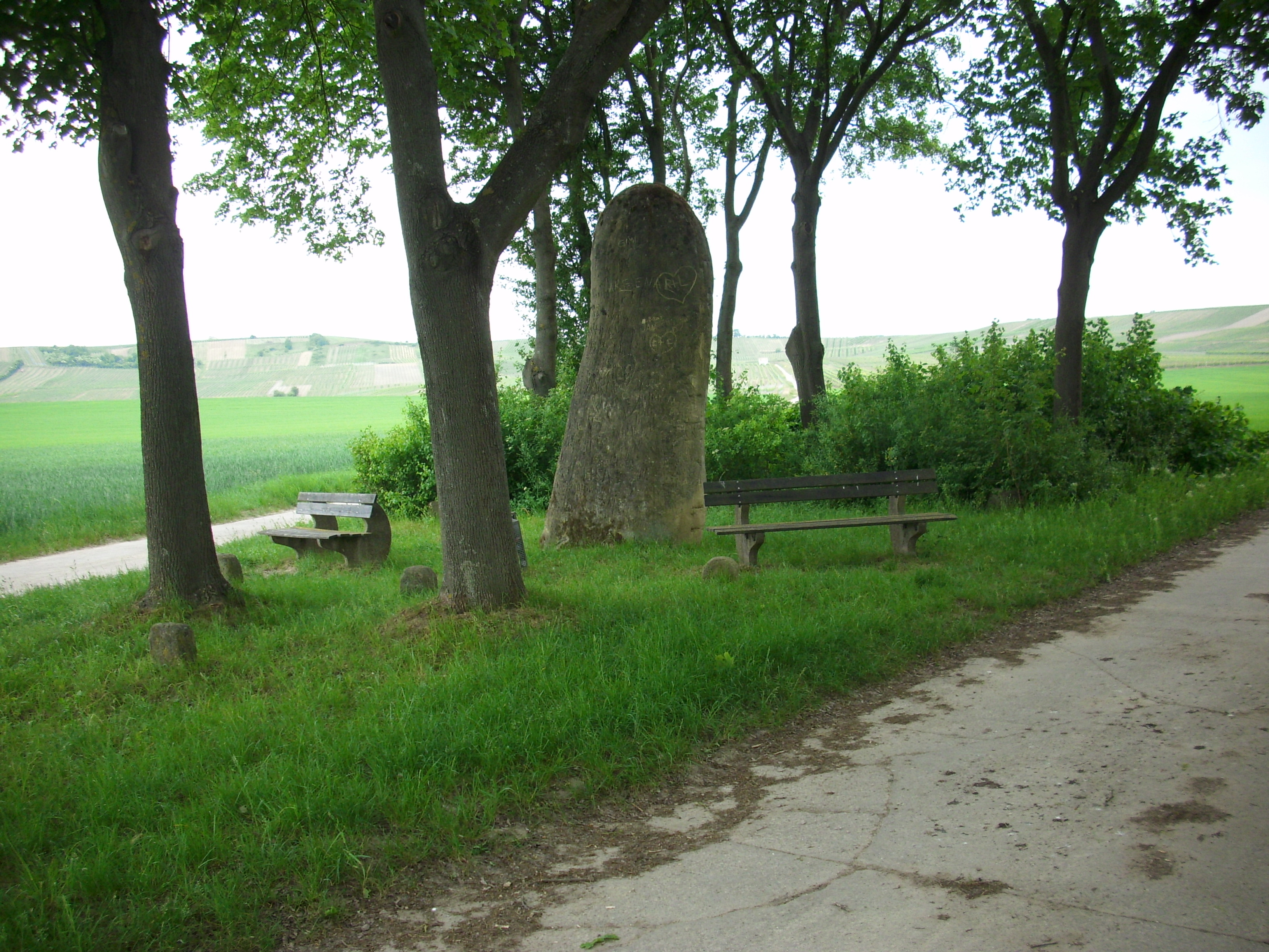 Menhir von Selzen(?) Es bestehen Zweifel darüber, ob es sich bei diesem Stein um einen echten Menhir handelt. Vielmehr geht man davon aus, dass es sich um einen natürlich gewachsenen Obelisk handelt, der 1968 in einer Kiesgrube zwischen Selzen und Mommenheim gefunden wurde und auf den gegenwärtigen Standort verbracht und aufgestellt worden ist.